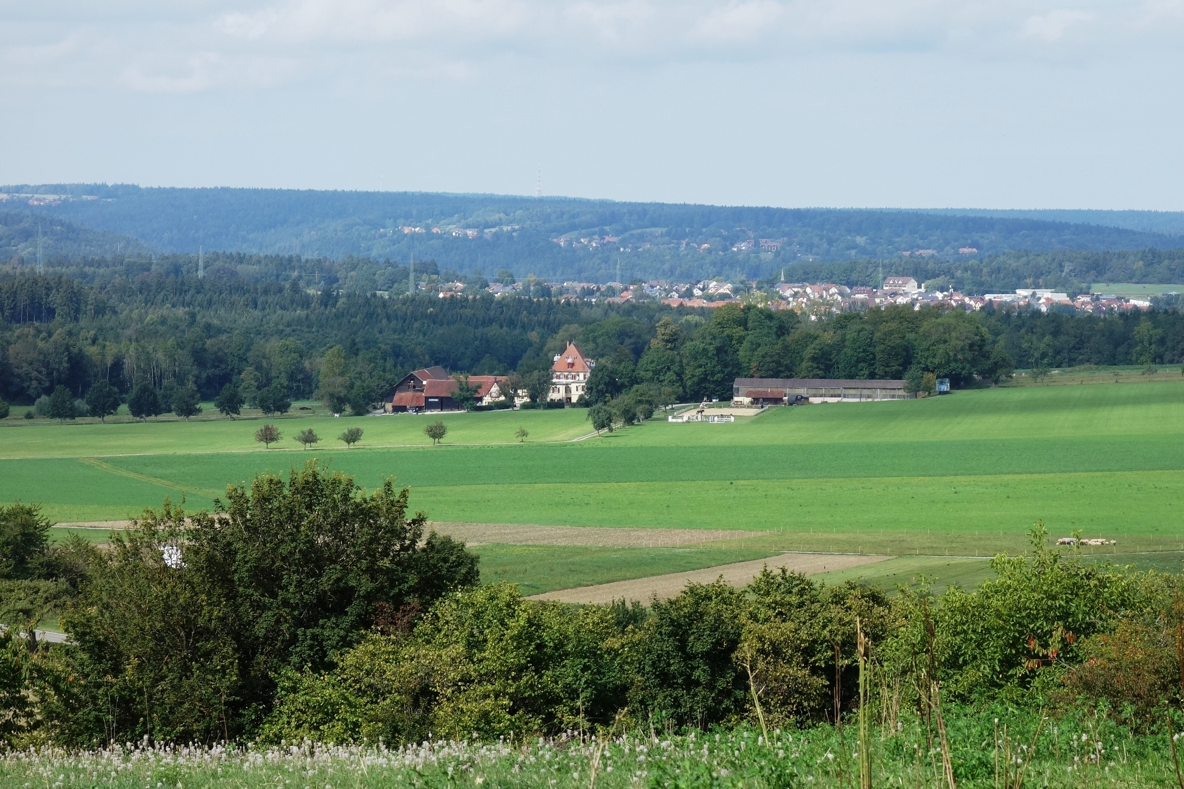 Das Hofgut Georgenau (Bad Liebezell - Möttlingen9, von der Straße Simmozheim - Georgenau aus, aufgenommen Oktober 2019.